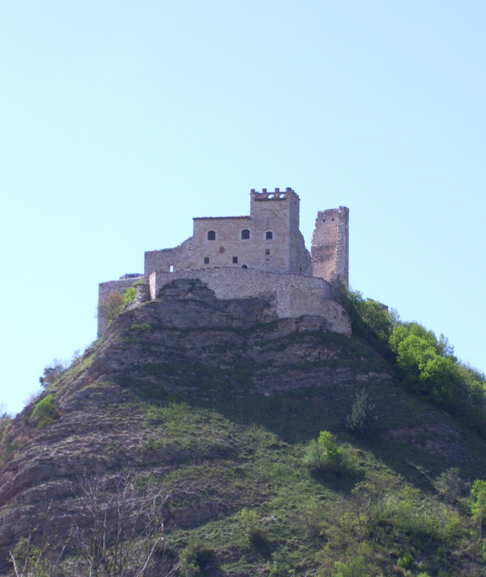 La Rocca dei Varano vista dall'abitato della Sfercia nel Comune di Camerino